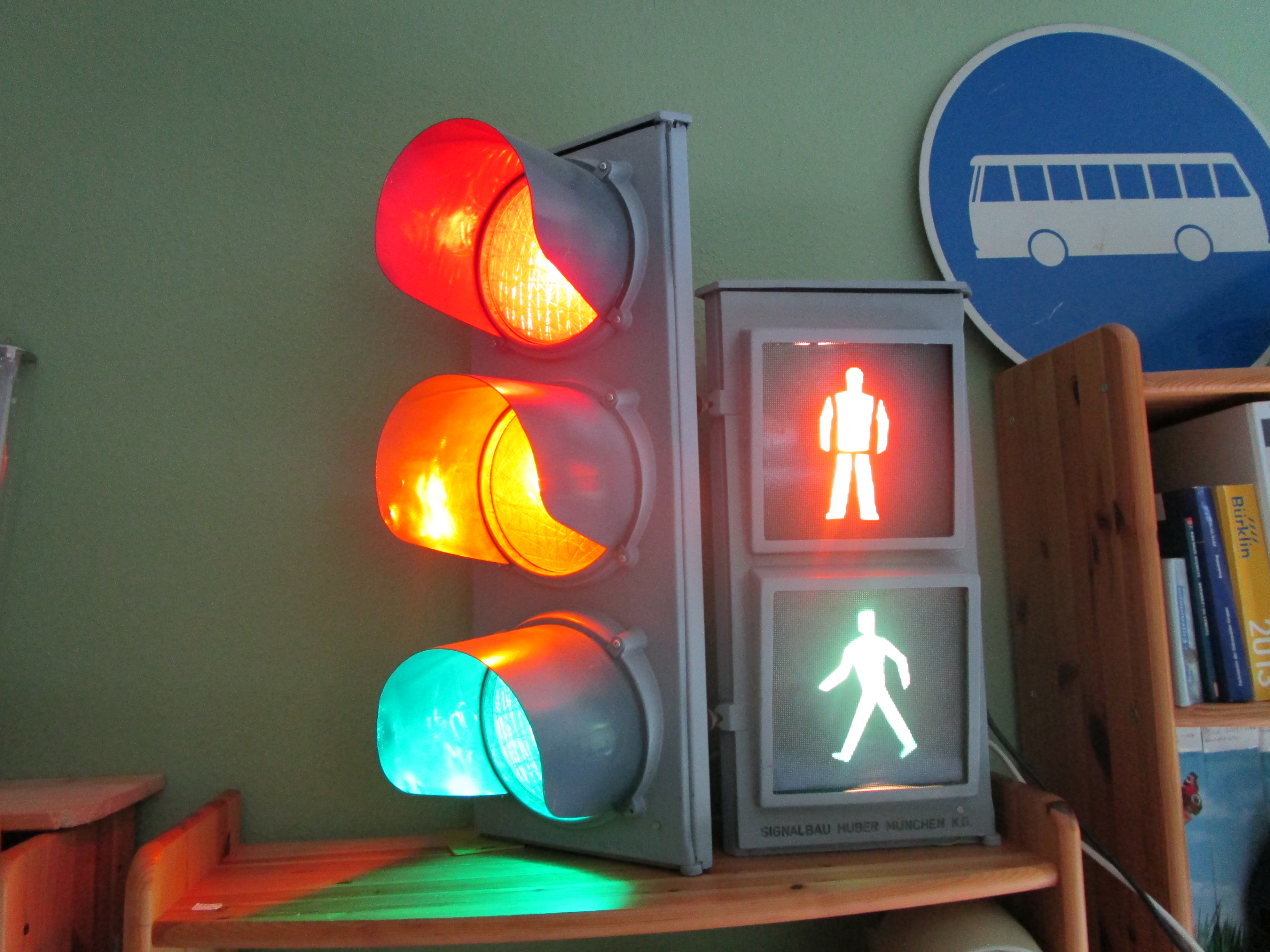 Hier meine beiden Signalgeber aus den 50er Jahren. Der Fußgänger-Signalgeber stammt aus München. Nur dort gab es diesen Typ mit eckigen Streuscheiben.